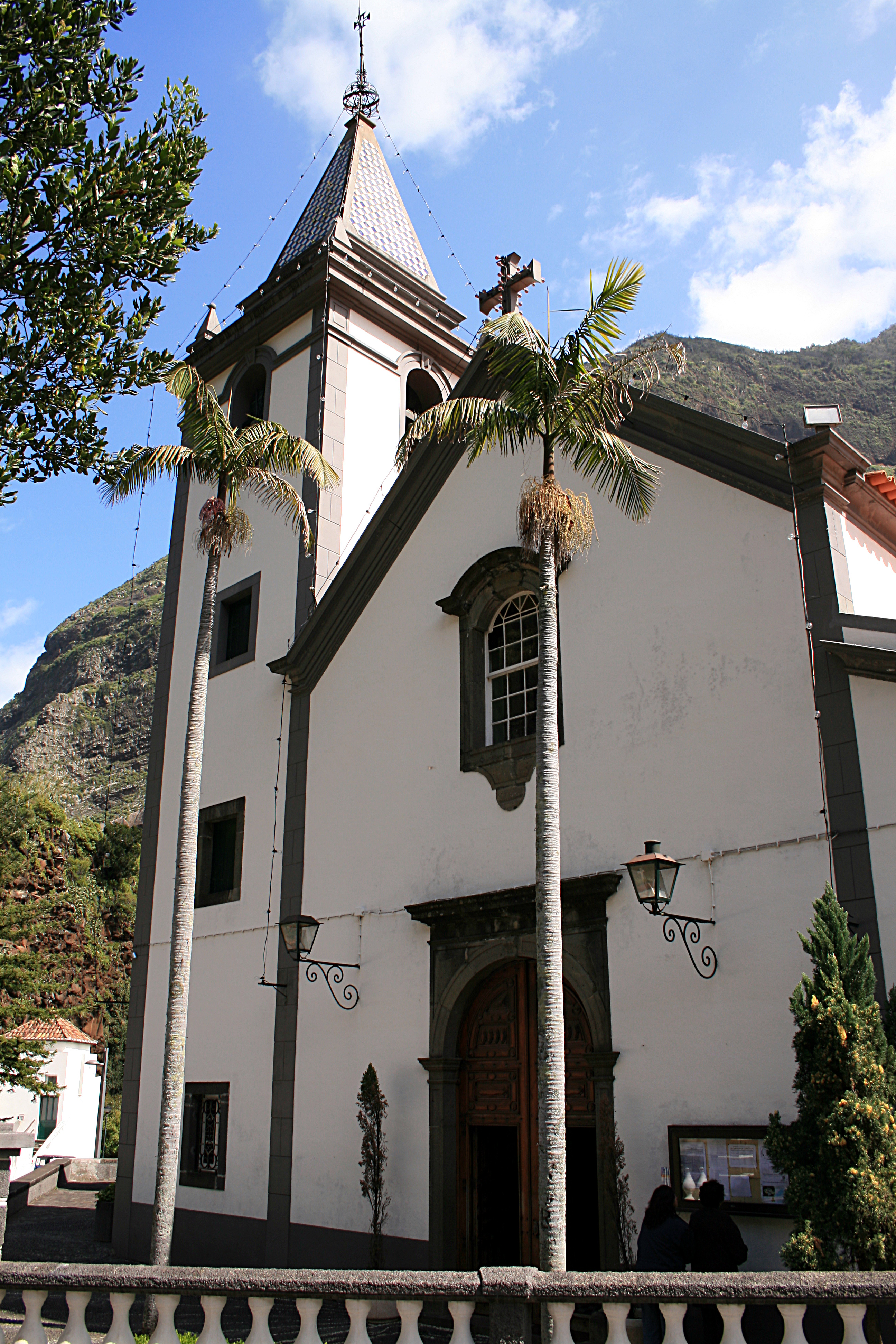 São_Vicente_(Madeira)_Church